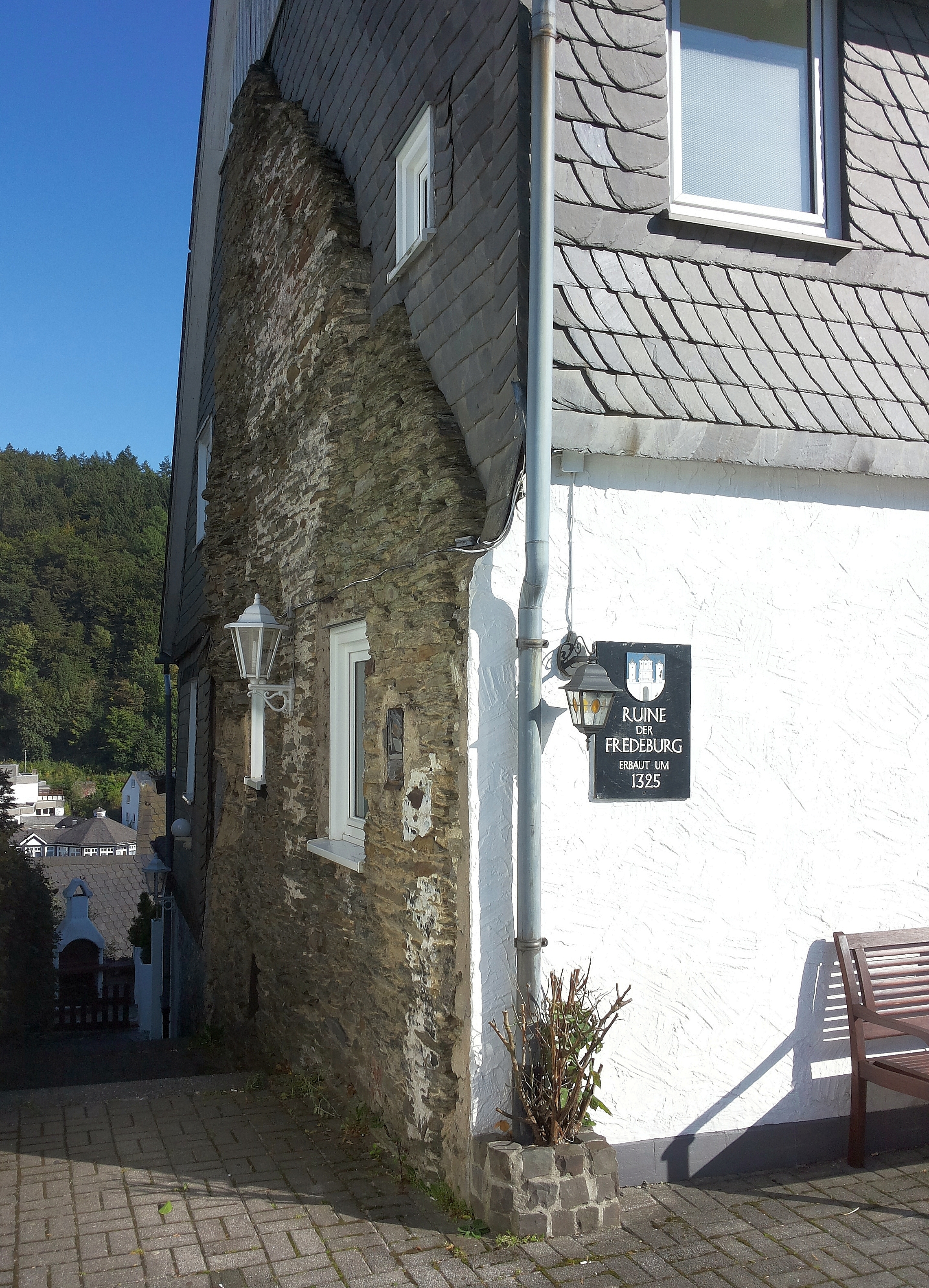 Bürgerhaus (nördliche, bruchsteinerne Giebelwand), Ruine der Fredeburg, Erbaut um 1325, in Schmallenberg-Fredeburg